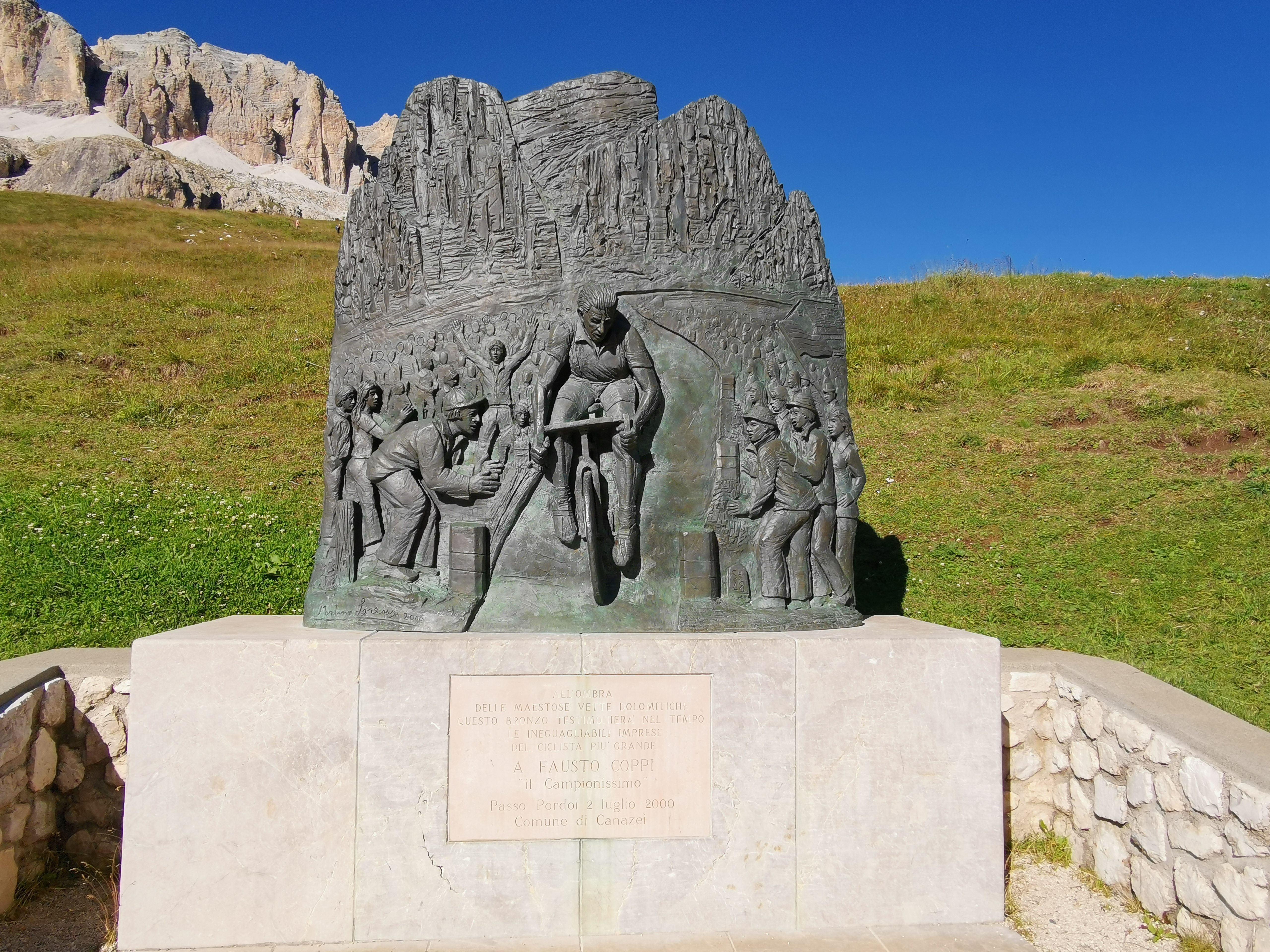 Denkmal für Fausto Coppi am Passo Pordoi in Südtirol